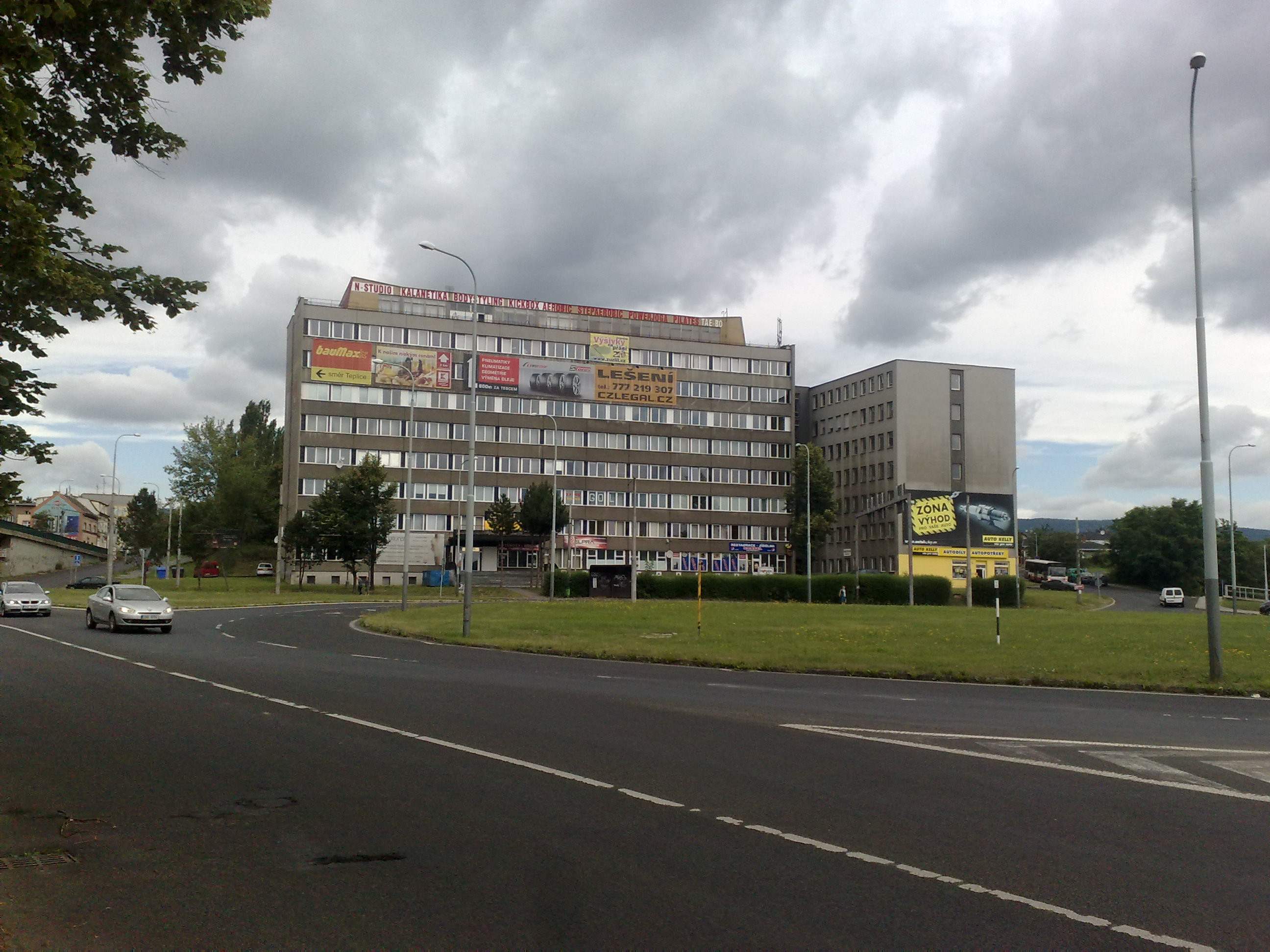 Ústecký Rondel.